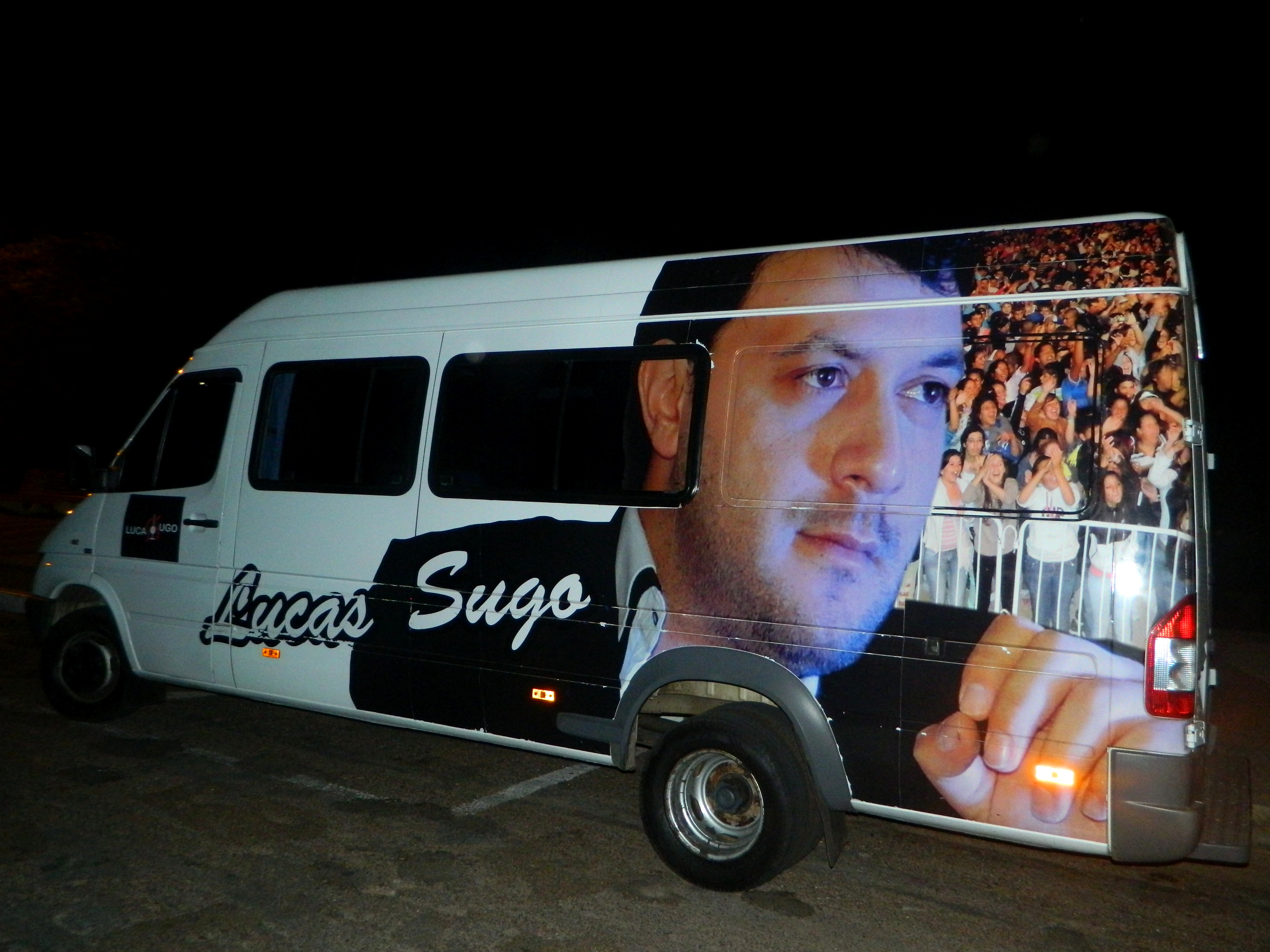 Lucas Sugo y su banda. Medio de transporte que usan cada semana para brindar sus conciertos.